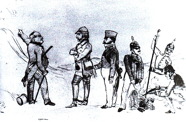 Иван Тургенев и цензор Мусин-Пушкин. Карикатура Л. Н. Вакселя